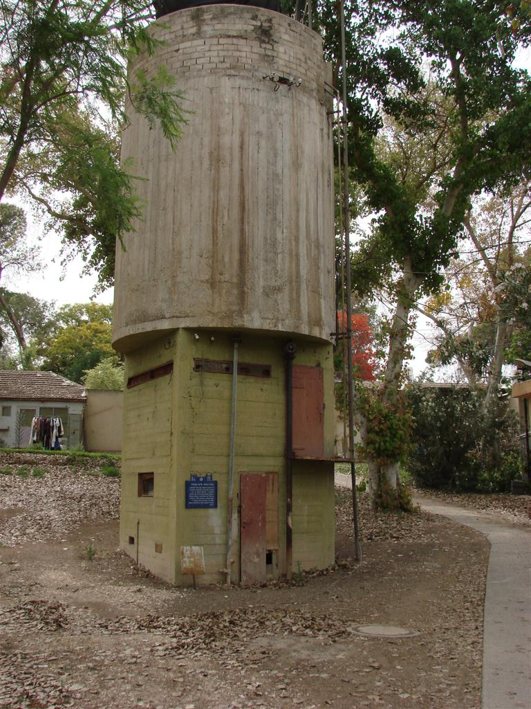 מגדל המים בטירת צבי 3